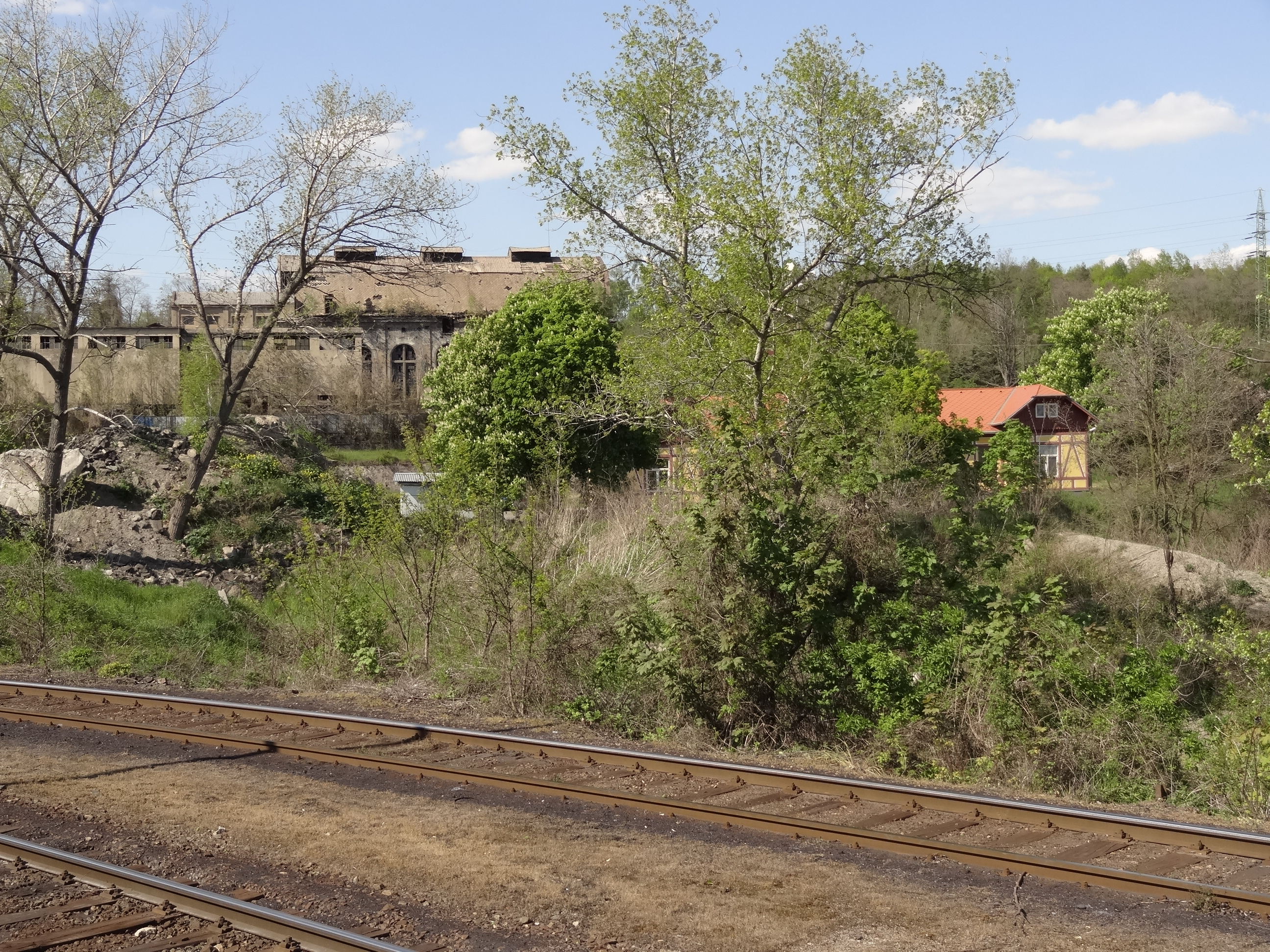 Budova nákladního nádraží Kladno-Dubí, Oldřichova č.p. 761, parc. 1781, vlastník České dráhy, Dubí, Kladno.